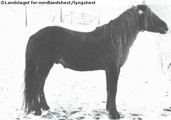 en av stamfedrene til n/l